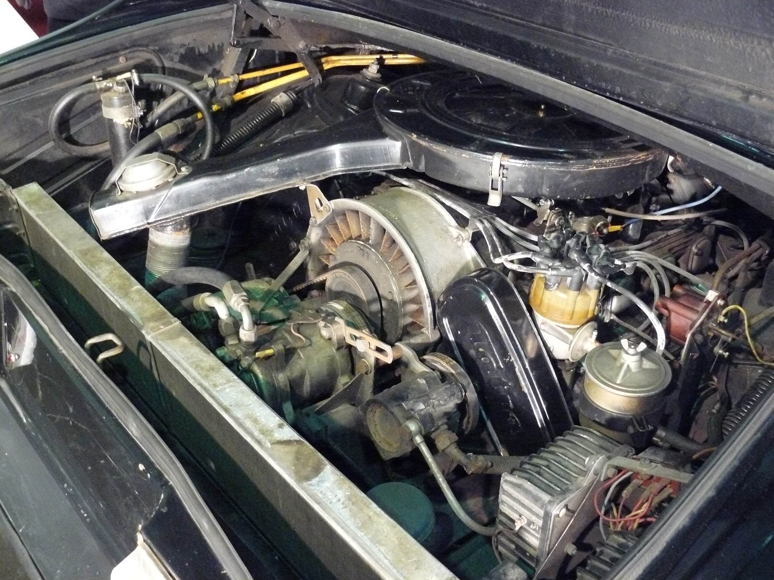 Essen 2011